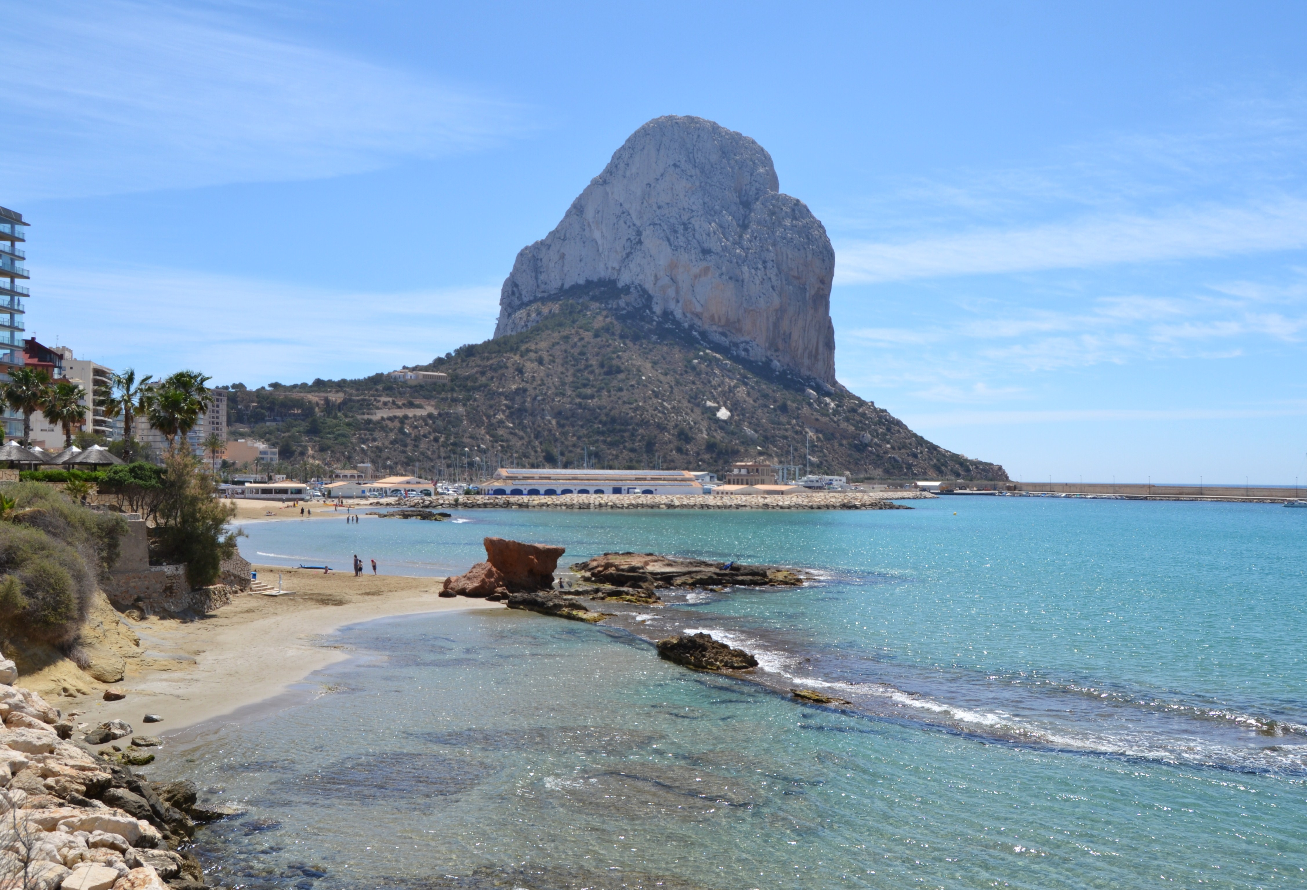 Vista de la platja del Cantal Roig i el penyal d'Ifac. This is a a photo of a beach in the Land of Valencia, Spain, with id: PL-1285